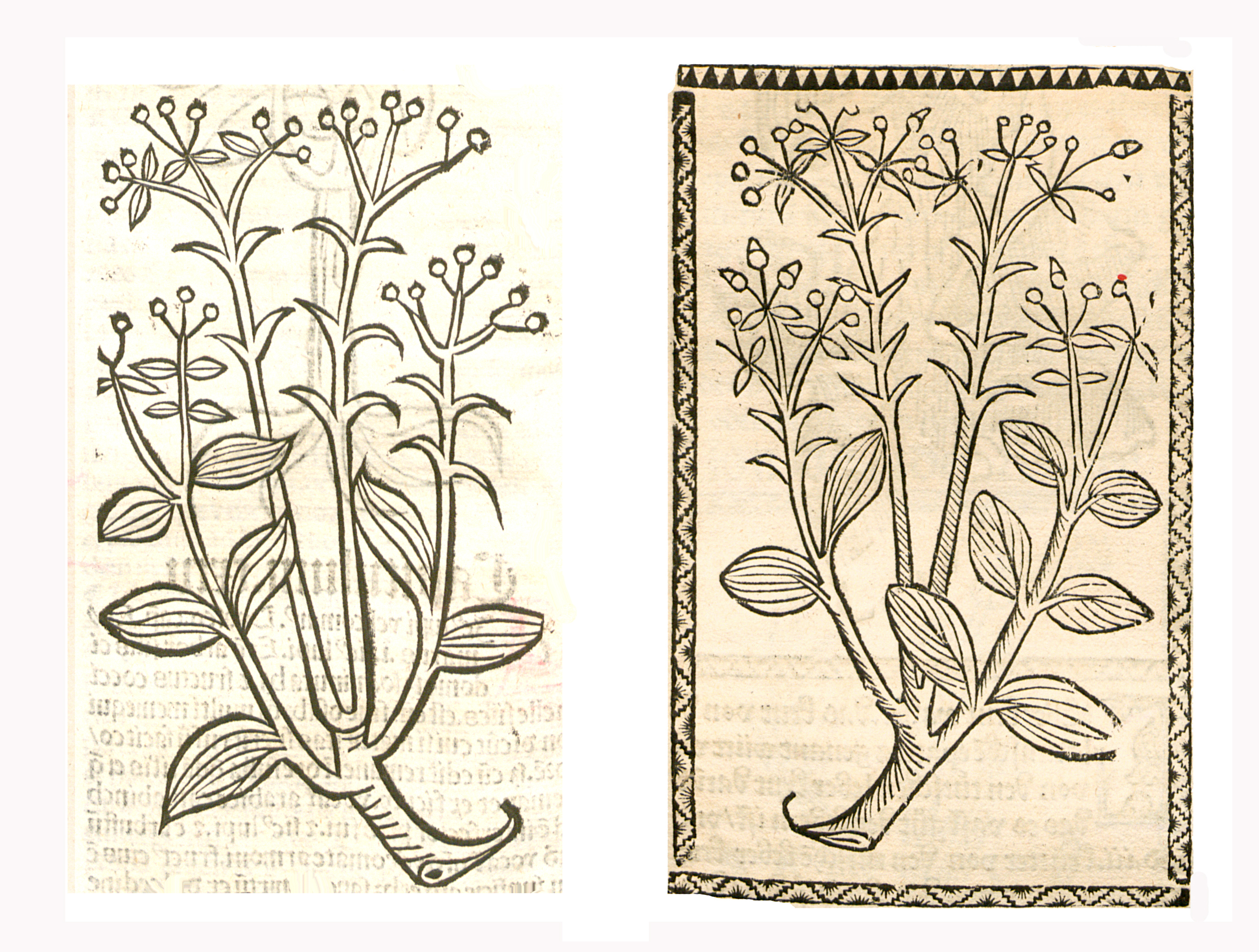 Abbildung von Lienen Blume (Lonicera periclymenum)